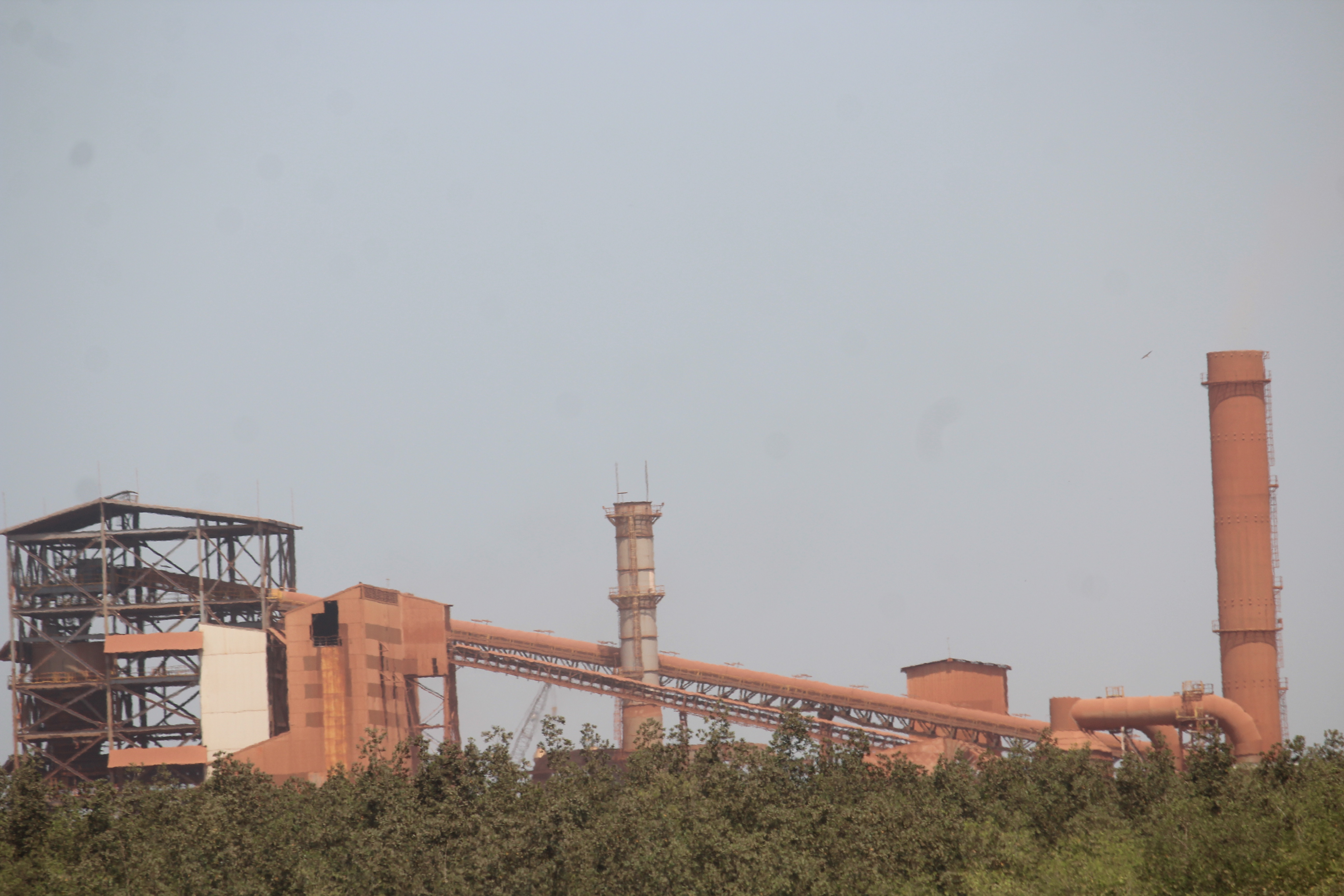 Tapis de GAC a kamsar This is an image with the theme "Africa on the Move or Transport" from: Guinea